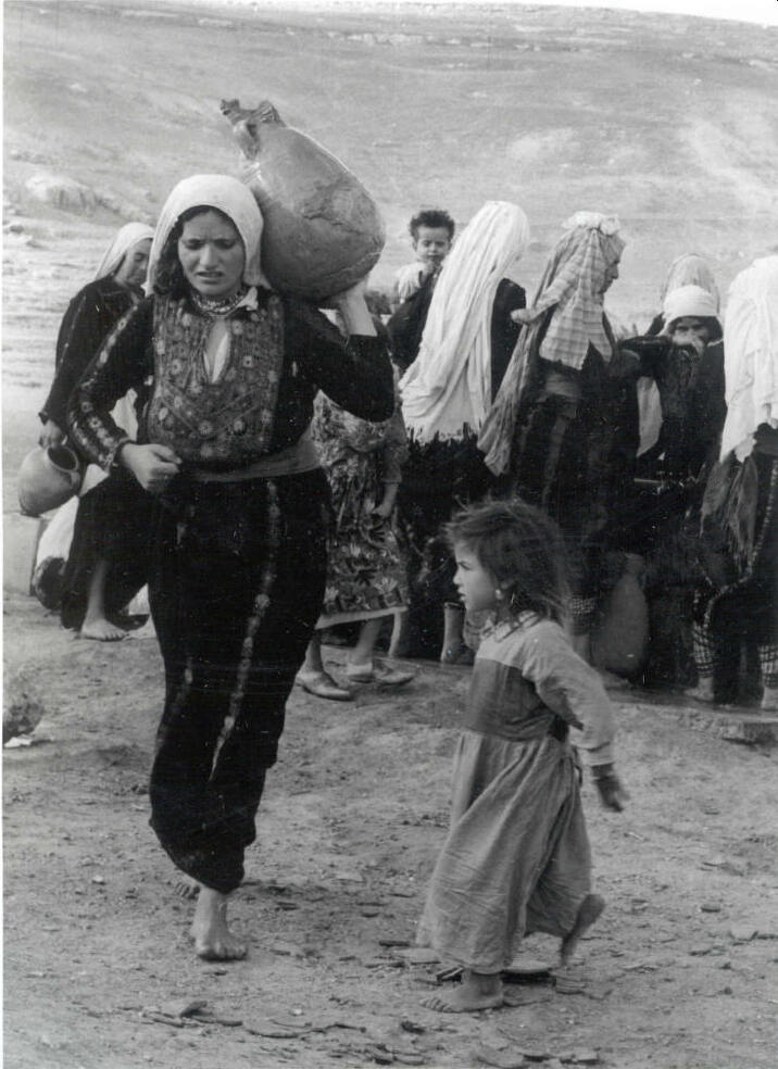 nakba woman jug 1948